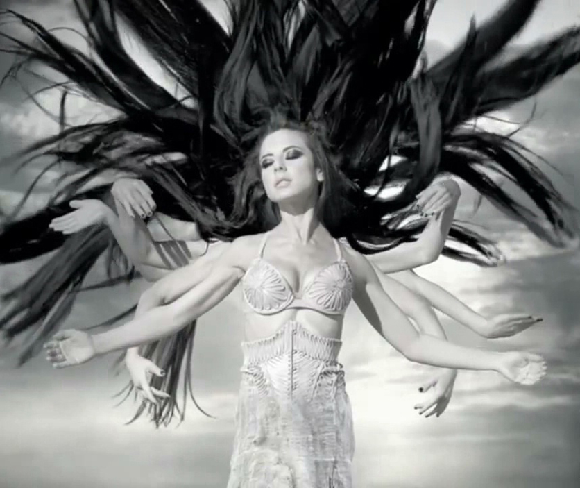 Анна Плетнёва в кадре из клипа Деревья группы Винтаж